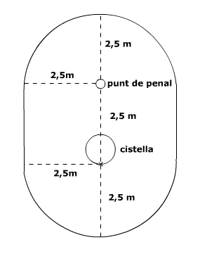 Àrea de penalti de corfbol i les seves dimensions